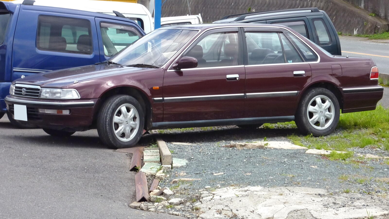 ホンダ・アスコット（初代）